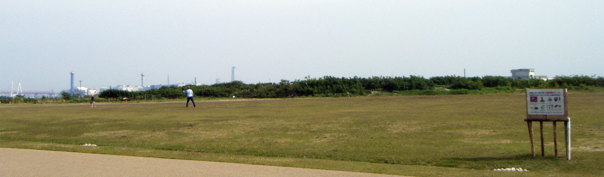 尼崎の森中央緑地 森づくり活動エリア 植栽後4～5年の森